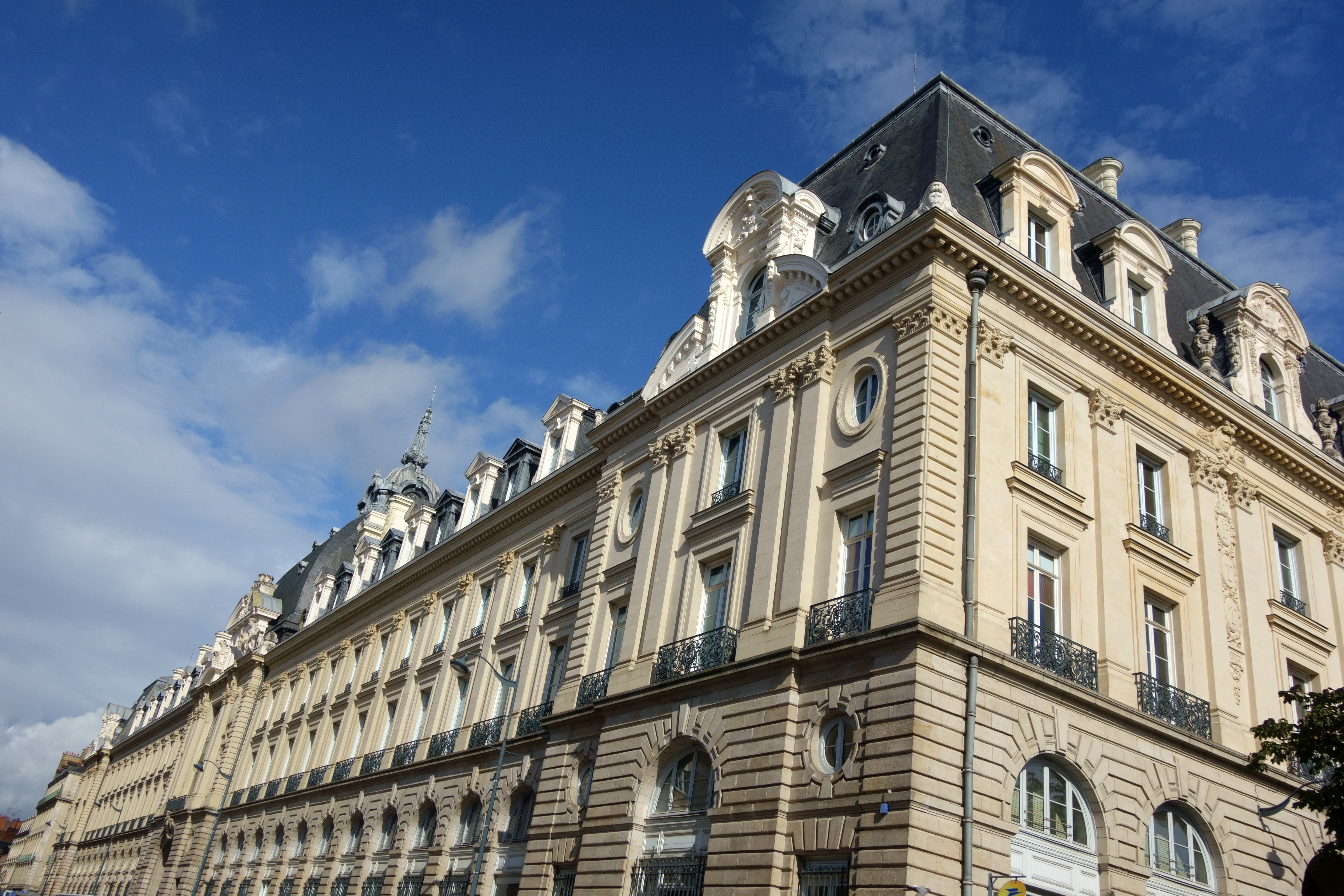 Vue depuis l'angle de la rue Maréchal Joffre et la rue du Pré-Botté... La « Café de la Poste »...